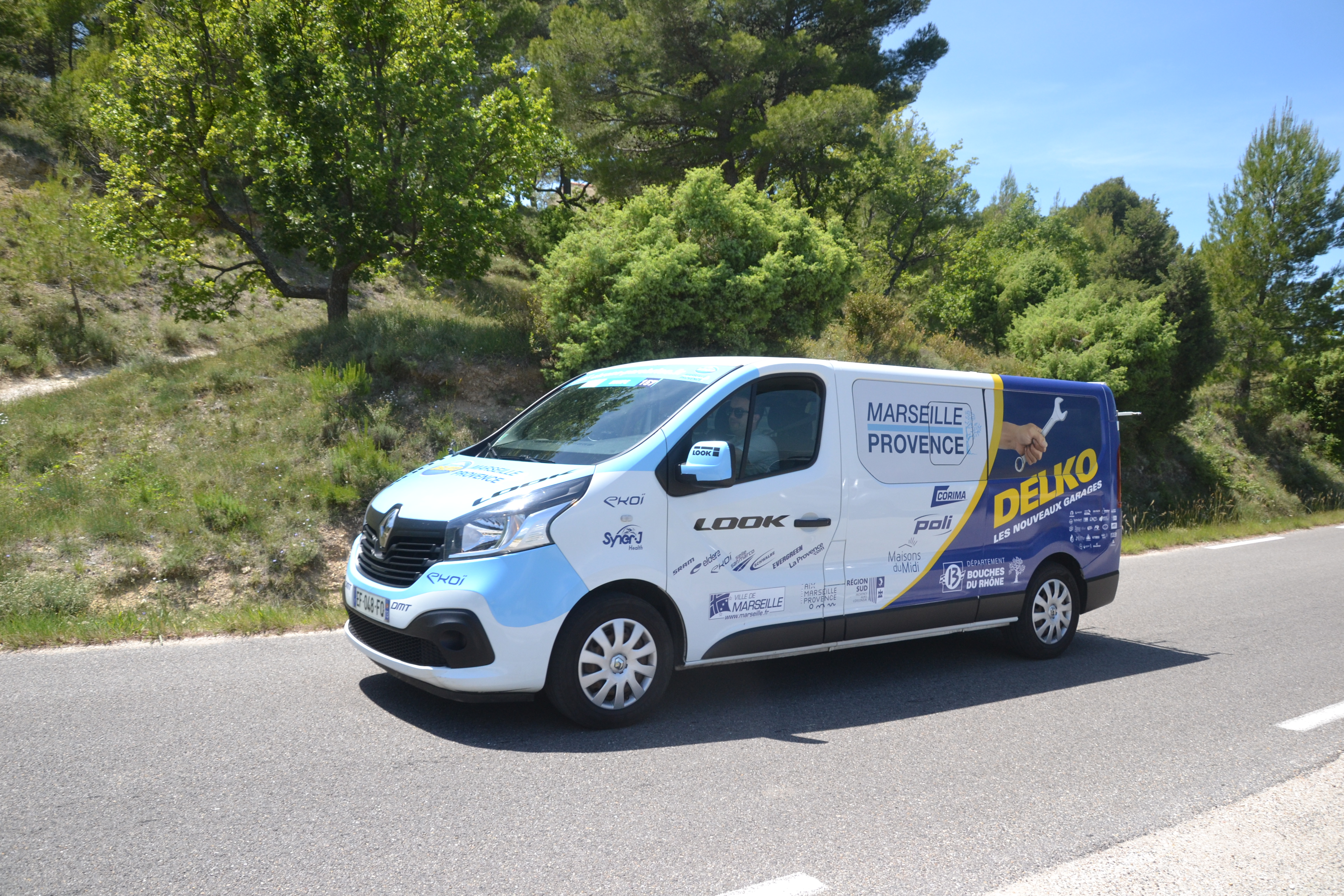 Mont Ventoux Dénivelé Challenges 2019 à Blauvac